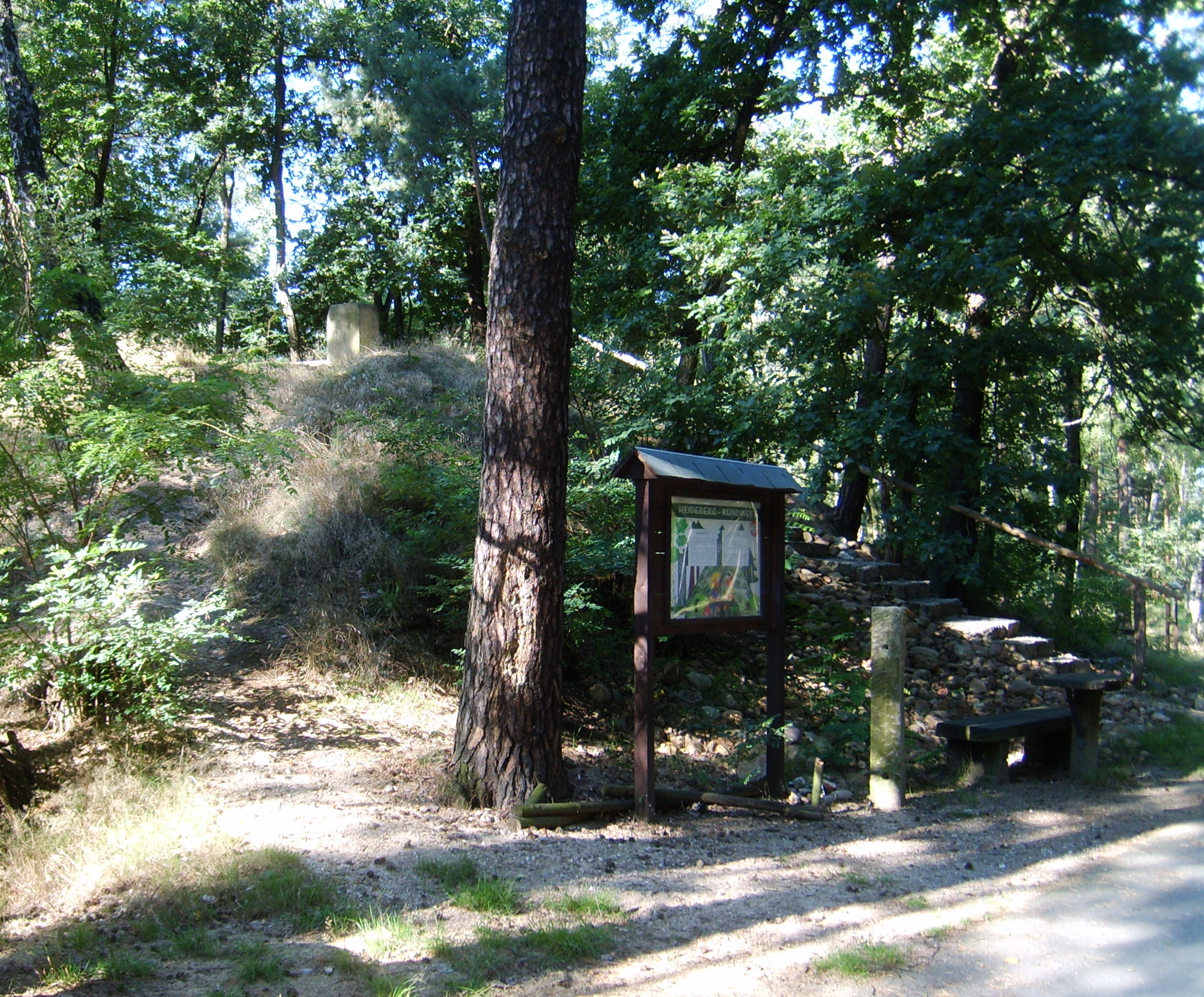 Gipfel der Heidehöhe, die höchste Erhebung im Bundesland Brandenburg. Brandenburgs höchste Erhebung ist die Steinsäule vor der Info-Tafel. Der künstlich aufgeschüttete Gipfel des Heidebergs befindet sich bereits in Sachsen.